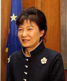 Γραφείο Πρωθυπουργού, Βουλή 5 Μαΐου, 2011